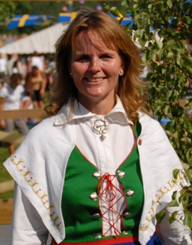 Bild på Nina Lundström, kommunalråd i Sundbyberg. Fotat på nationaldagsfesten i Sundbyberg, 6/6 2007.